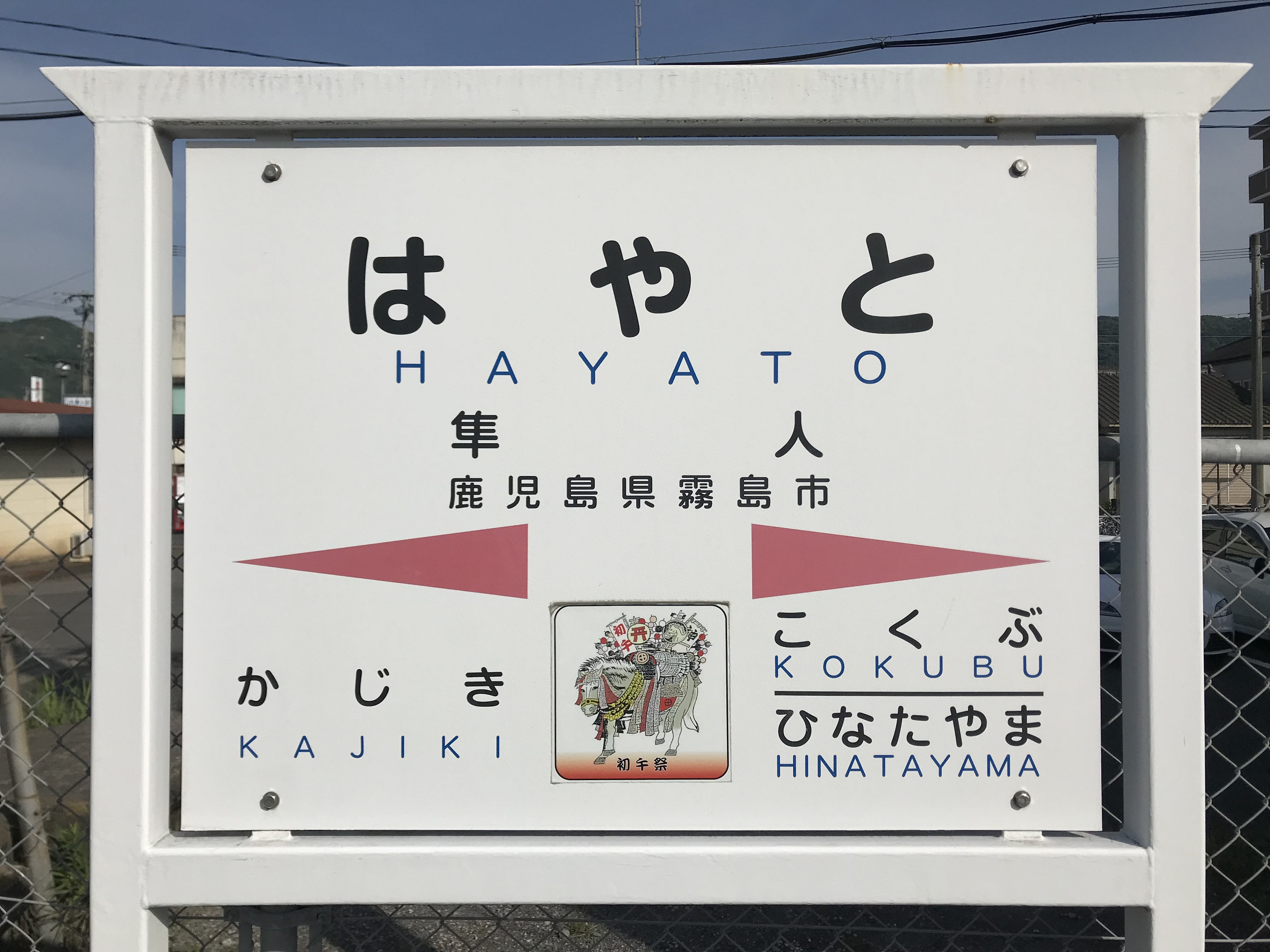 隼人駅の駅名標。イラストは鹿児島神宮の初午祭